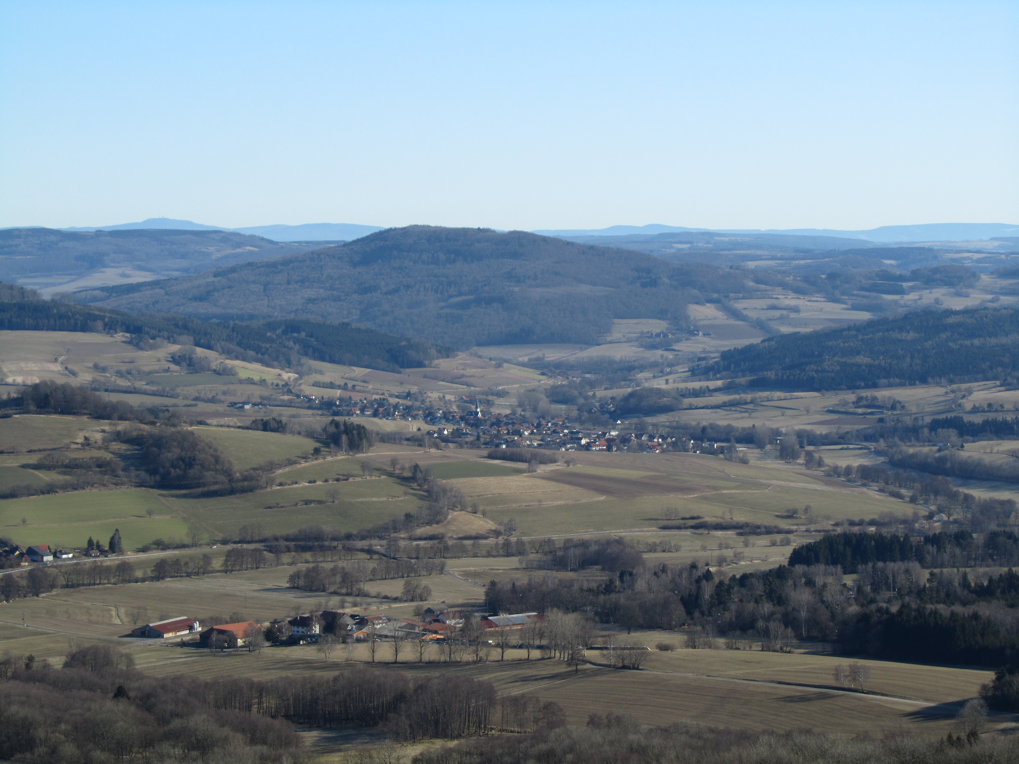 Blick von der Milseburg (838 m) nach Nordosten über das Scheppenbachtal zum Auersberg (757 m) in der Rhön. Im Tal mit der Kirche Eckweisbach, davor Liebhards, beides Ortsteile von Hilders. Im Hintergrund links der Große Inselsberg im Thüringer Wald.